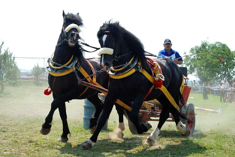 Furmani